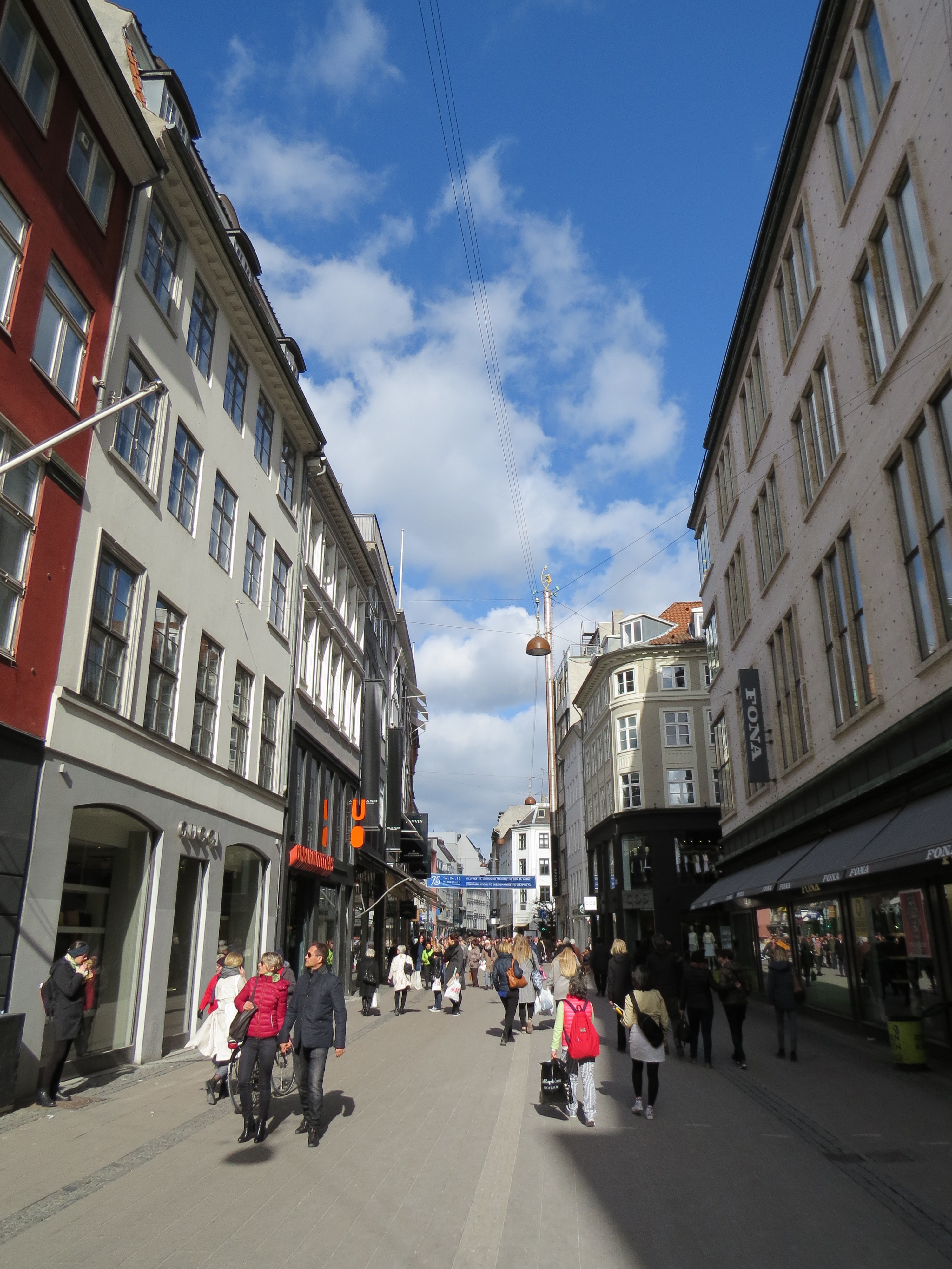 Strøget, København